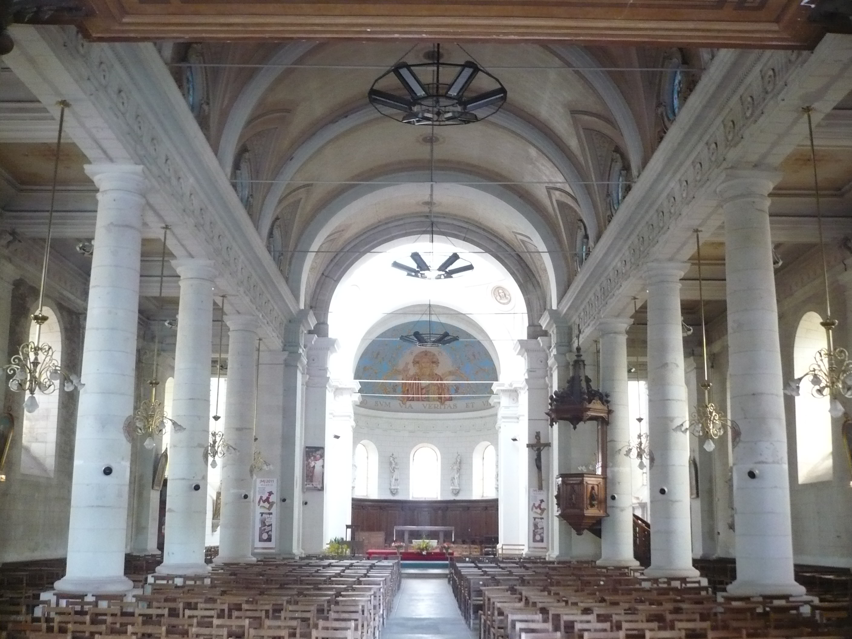 Eglise Sainte-Madeleine de Segré, Maine-et-Loire